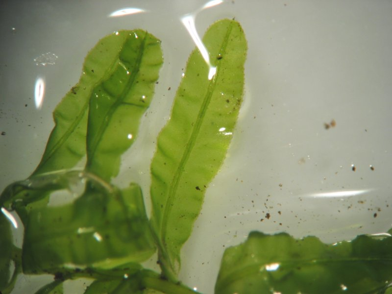 Plagiomnium undulatum, Rostock